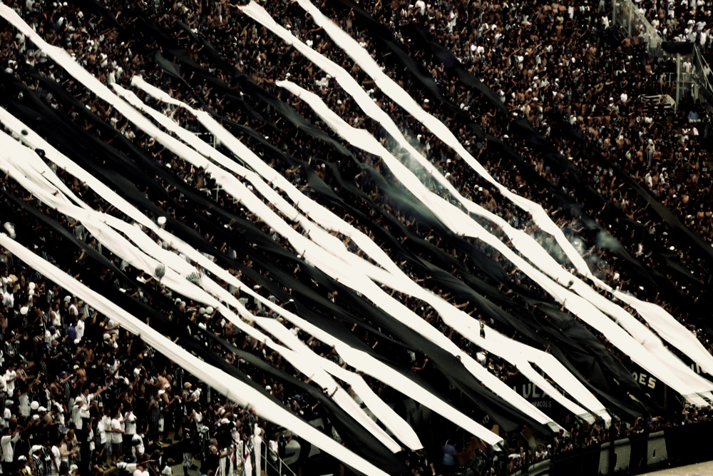 Torcida do Corinthians no Pacaembu.